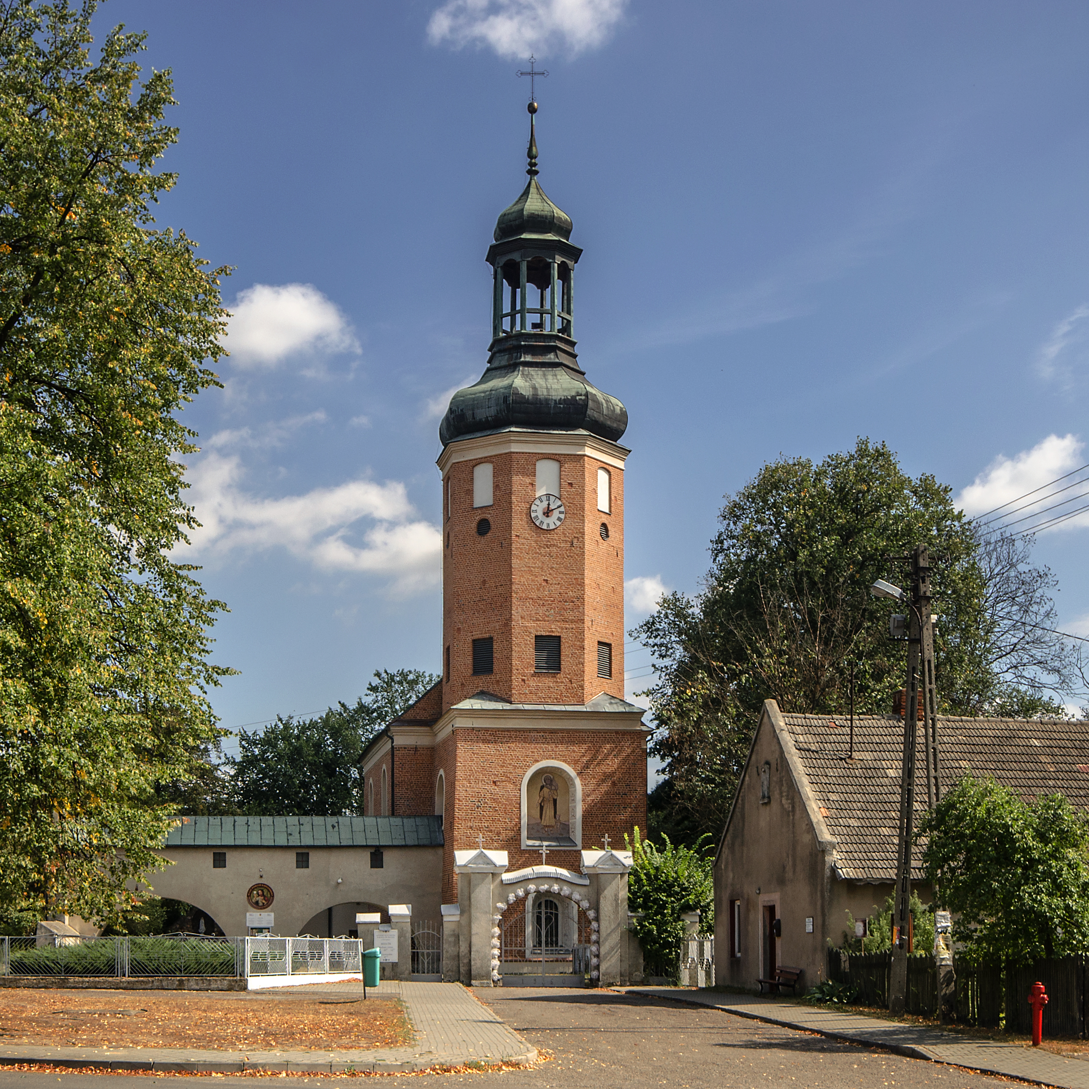 Konopnica, kościół św. Rocha (popauliński), 1642, 1858, 1934, 1977-1987